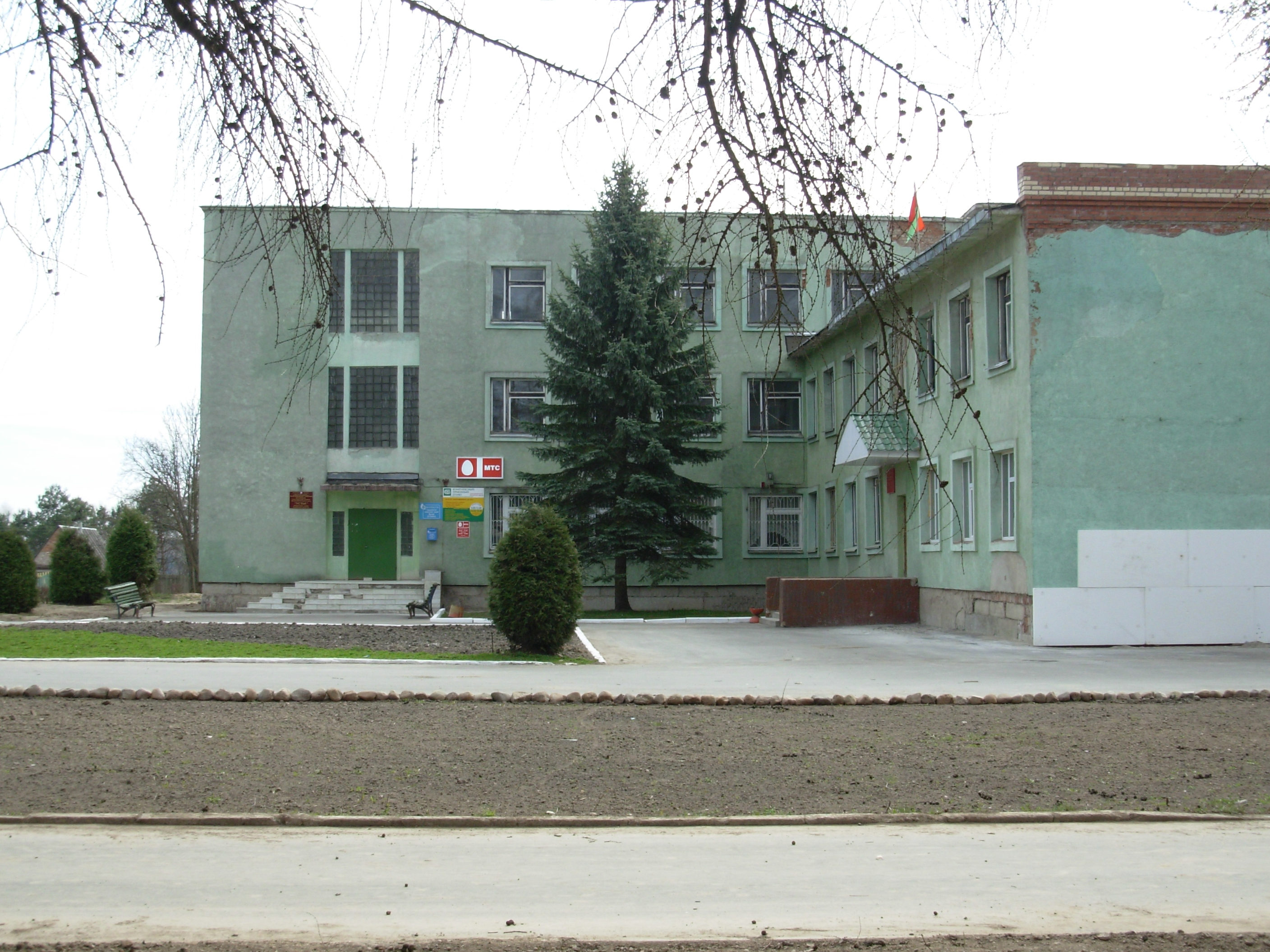 Беларуская (тарашкевіца): Шматфункцыянальны адміністратыўны будынак, в. Вусьце